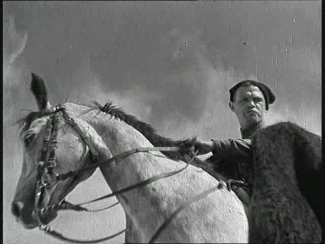 Чапаев на коне (кадр из фильма "Чапаев").